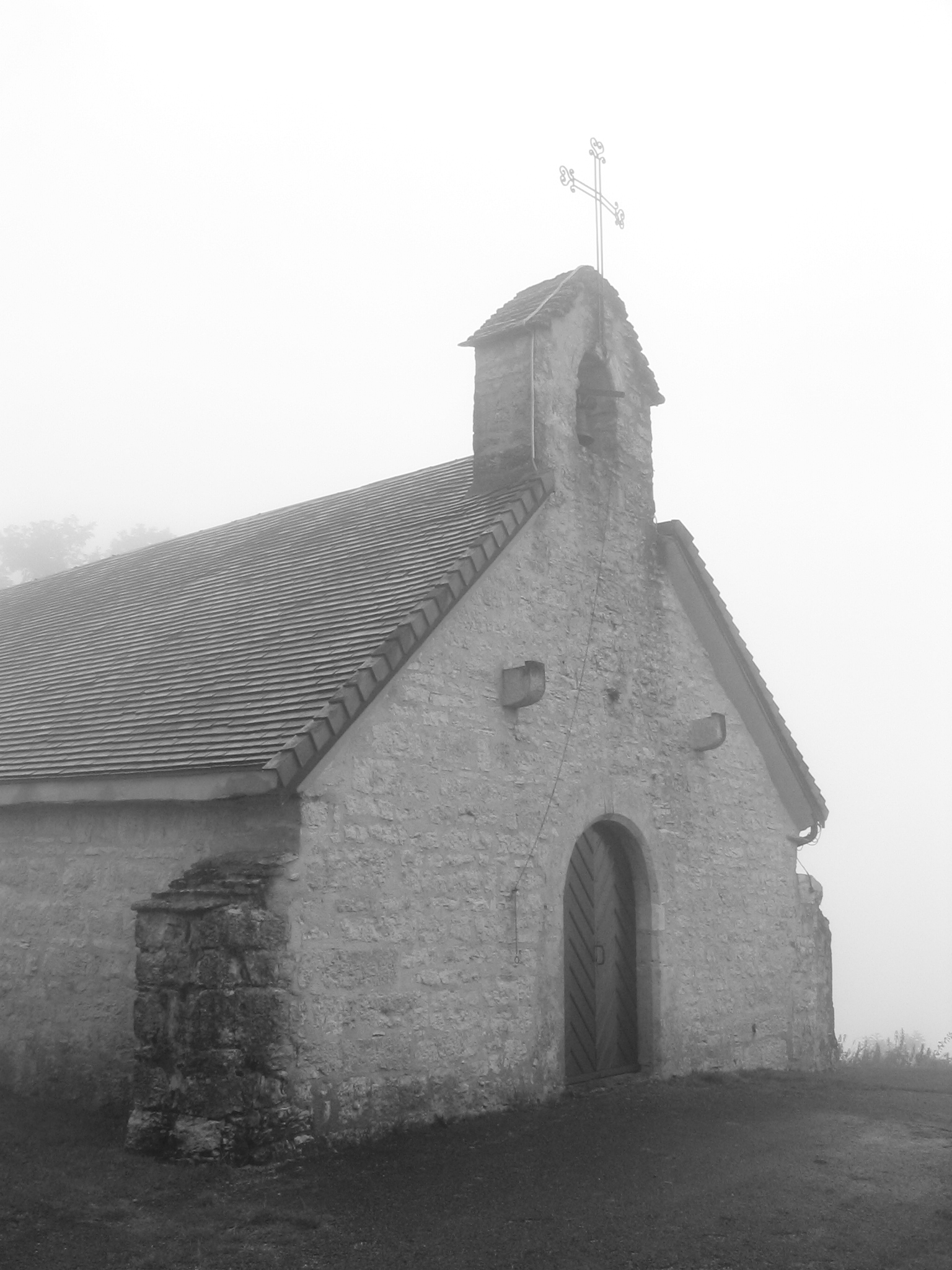 Chapelle d'Echevannes (Doubs), XVème siècle